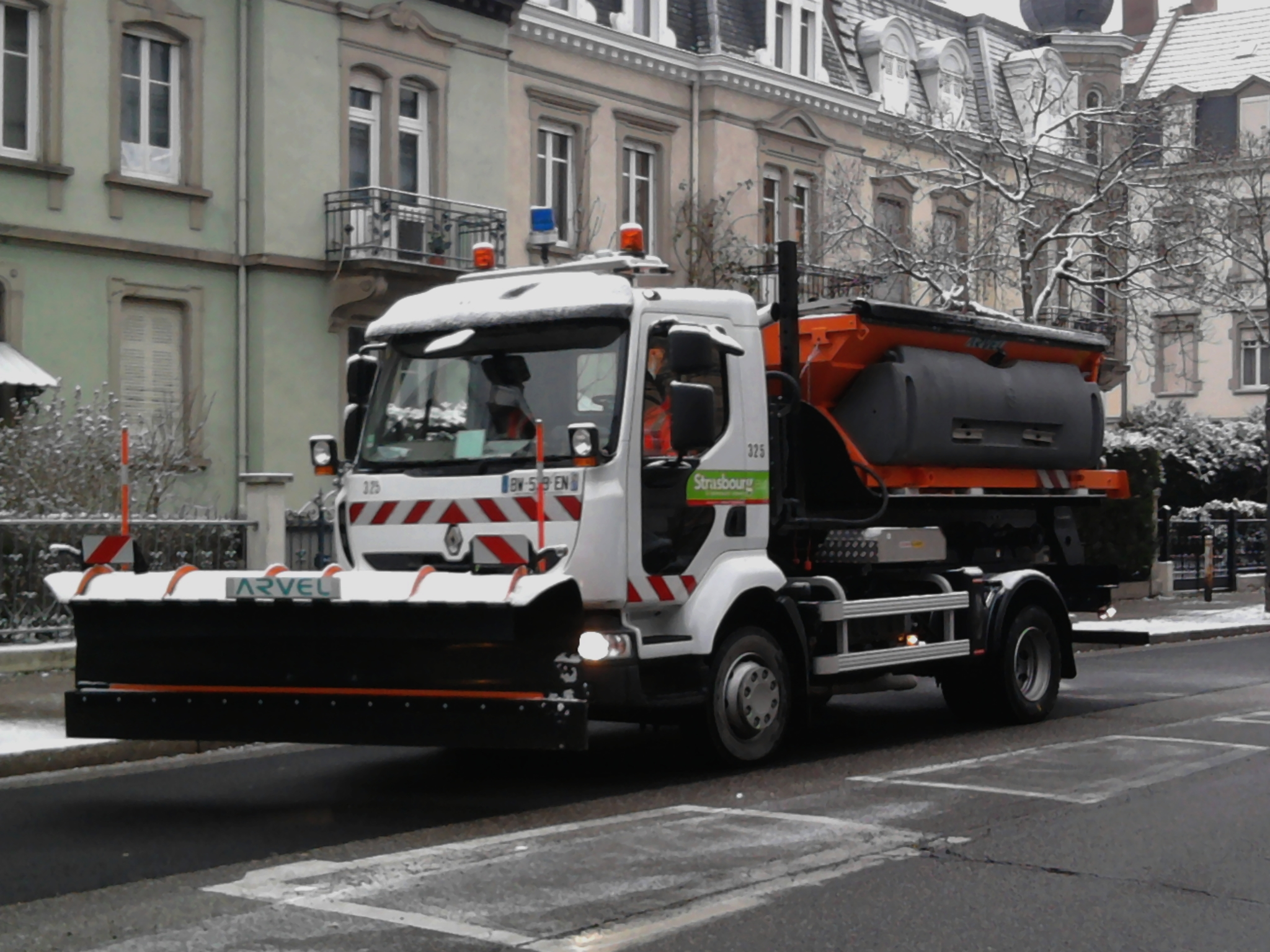 Chasse-neige de la communauté urbaine de Strasbourg